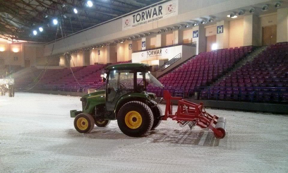 Reitbahnplaner, Leveler, Otto, Cavaliada